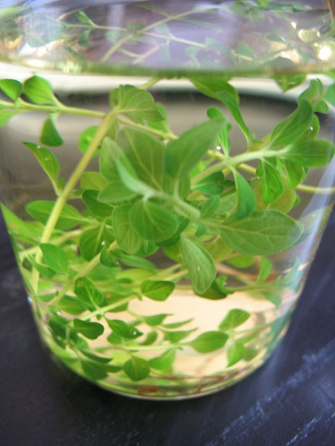 herbal tisane